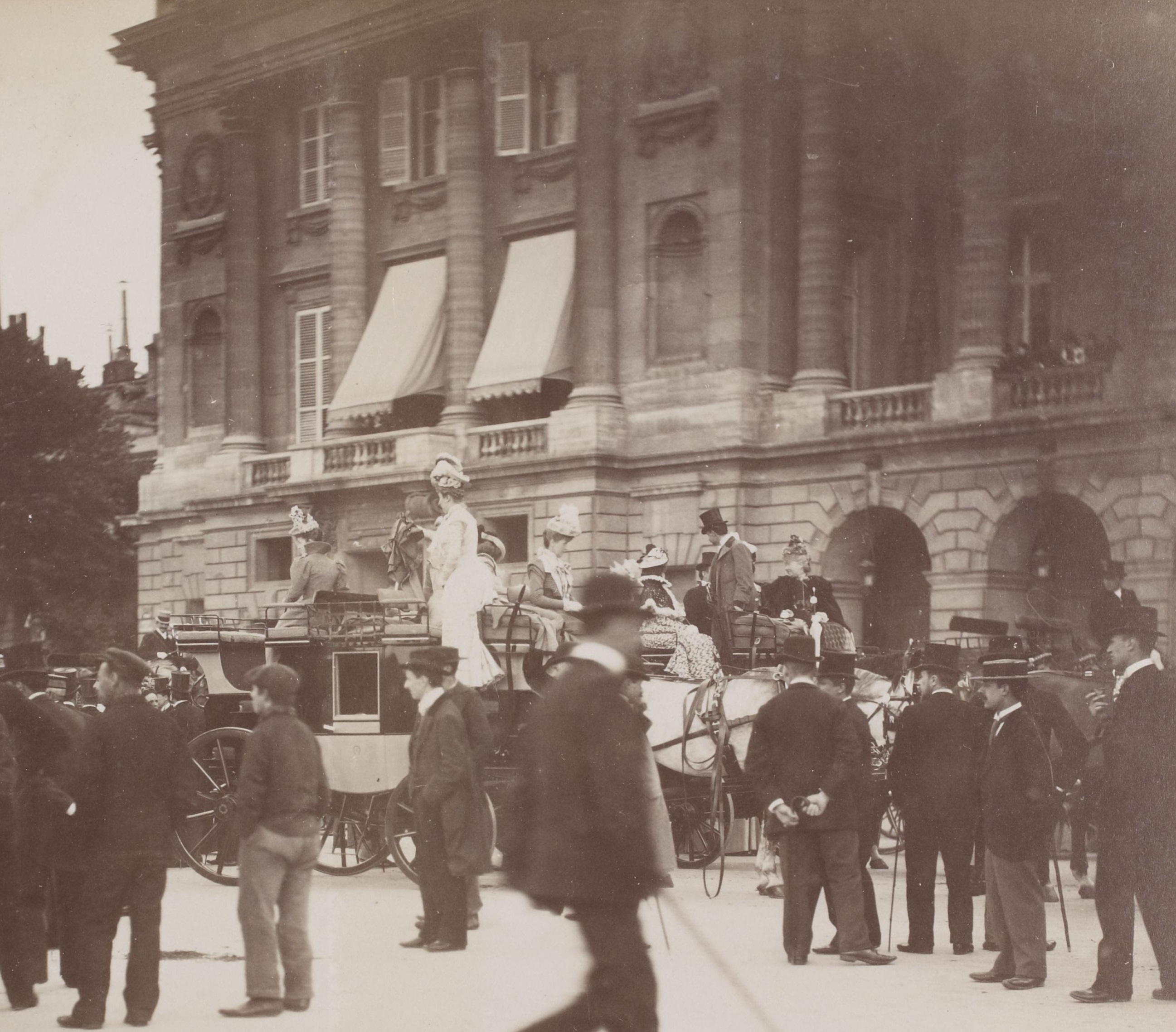 [Collection Jules Beau. Photographie sportive] : T. 7. Année 1898 / Jules Beau : F. 15v. La journée des drags, 4 juin 1898